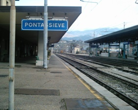 Pontassieve